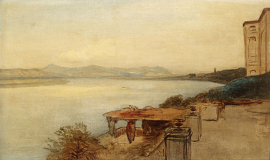 Albert Flamm: Blick auf das Siebengebirge, Oil on canvas, 33 x 56 cm